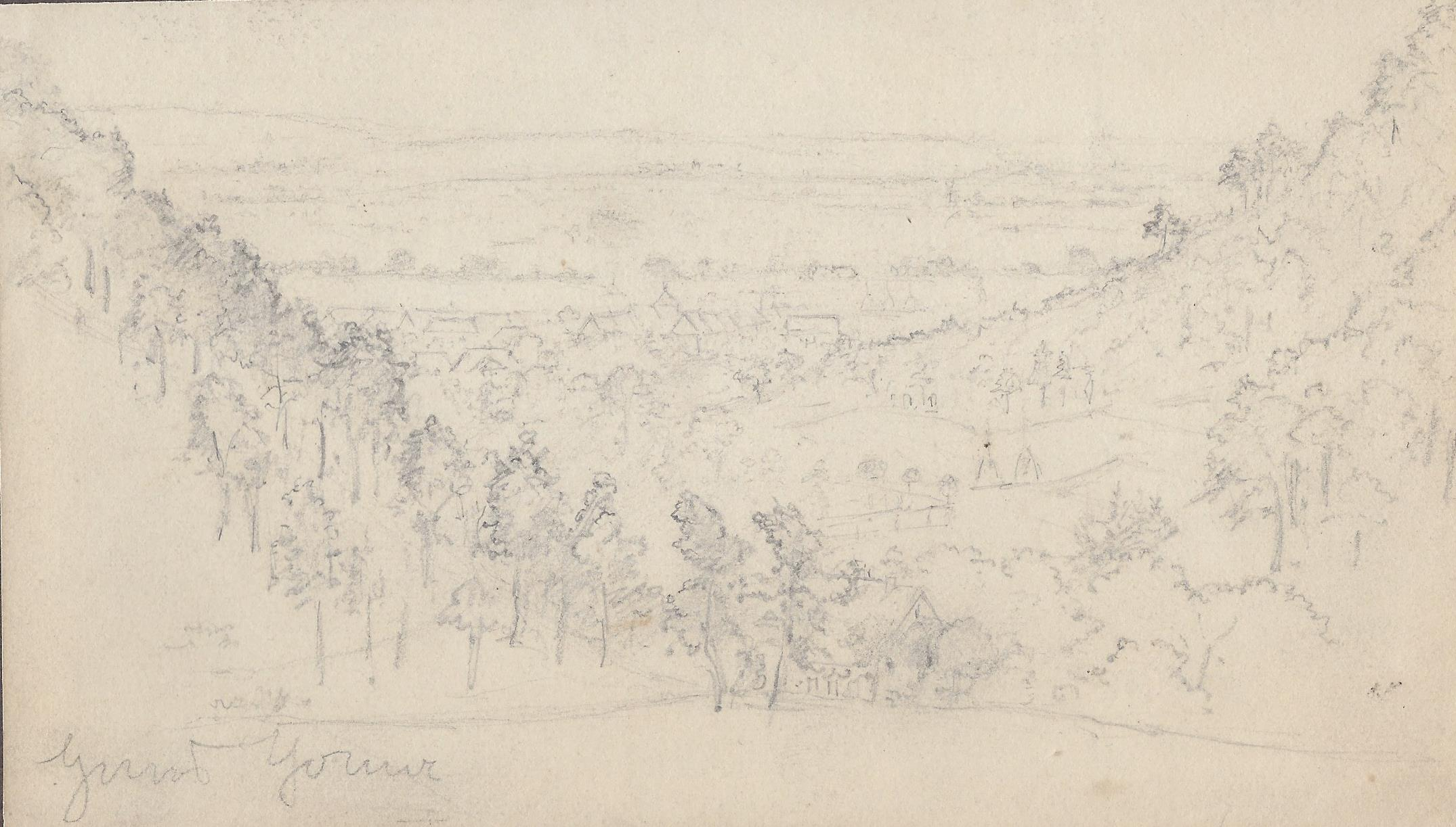 Sicht auf Luttingen und den Rhein. Skizzenblatt um 1860. Bleistift.